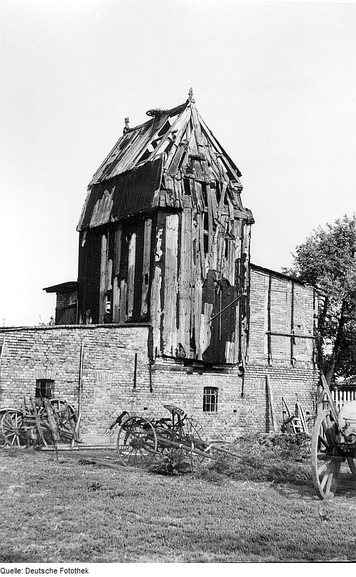 Original image description from the Deutsche Fotothek Packebusch-Hagenau. Windmühle, ruinös